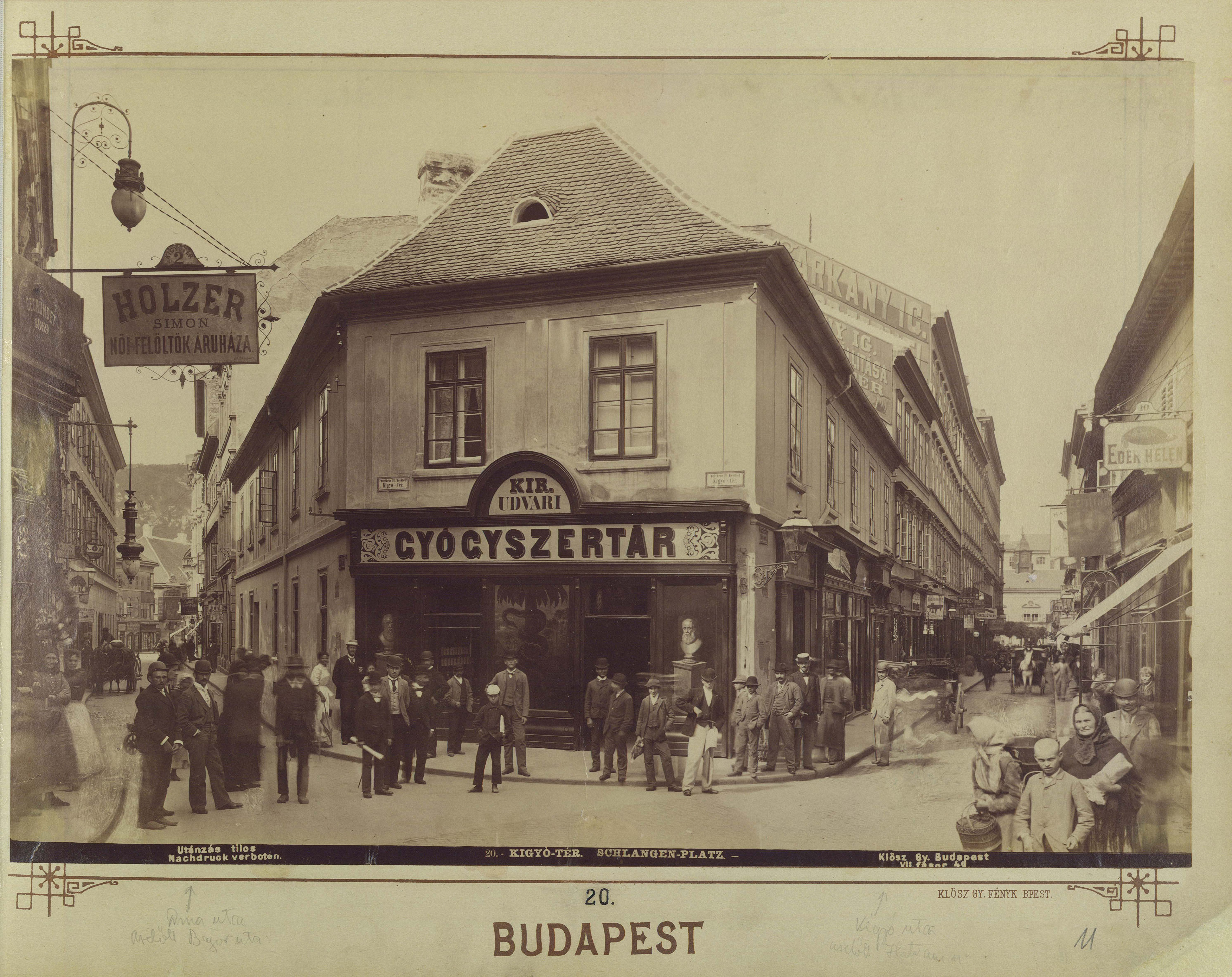 "Budapest, V. az egykori Kígyótér. A felvétel 1890 után készült." A kép forrását kérjük így adja meg: Fortepan / Budapest Főváros Levéltára. Levéltári jelzet: HU.BFL.XV.19.d.1.07.021 Location: Hungary Title: \